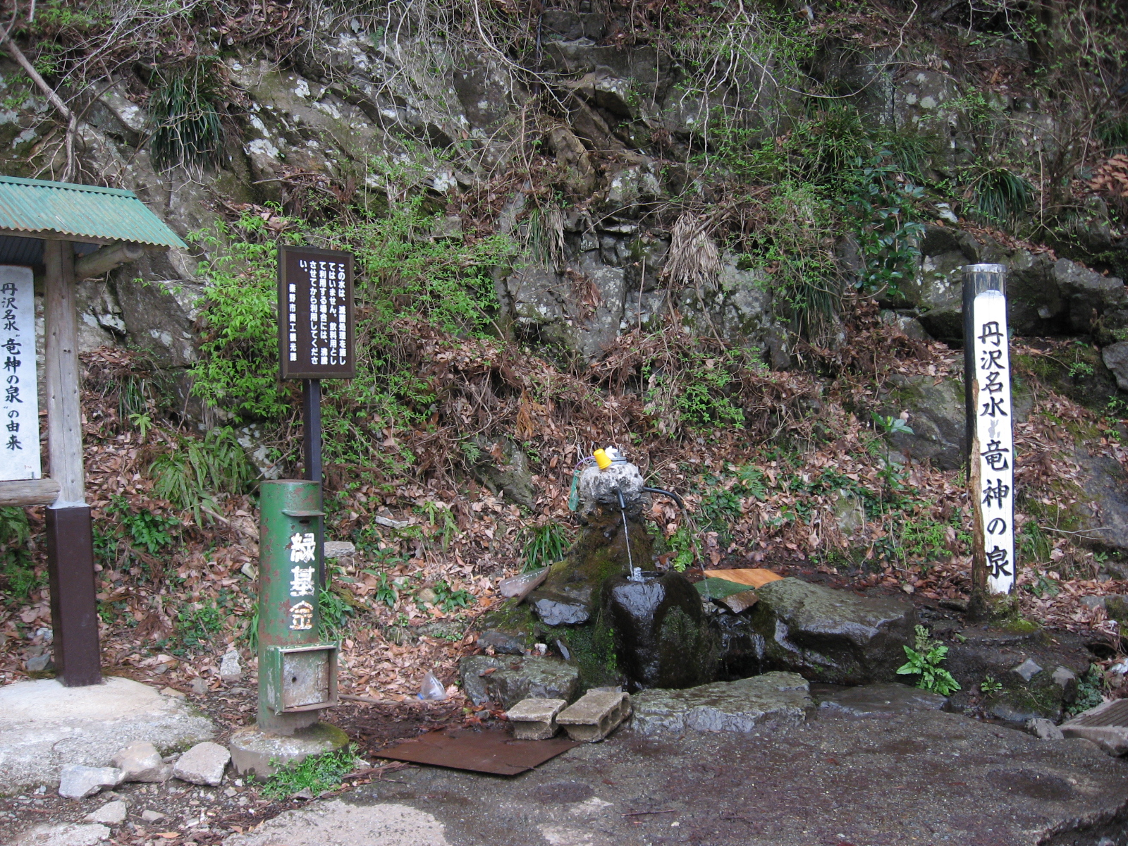 秦野盆地湧水群の「竜神の泉」